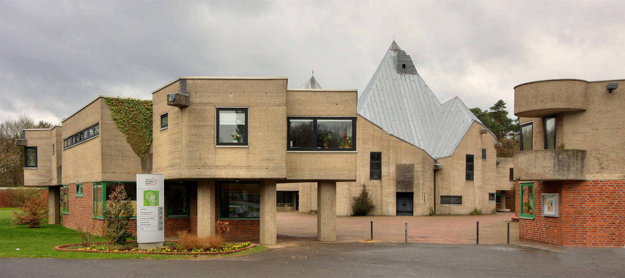 Kinderdorf Bethanien in Bergisch Gladbach-Refrath. Architekt: Gottfried Böhm